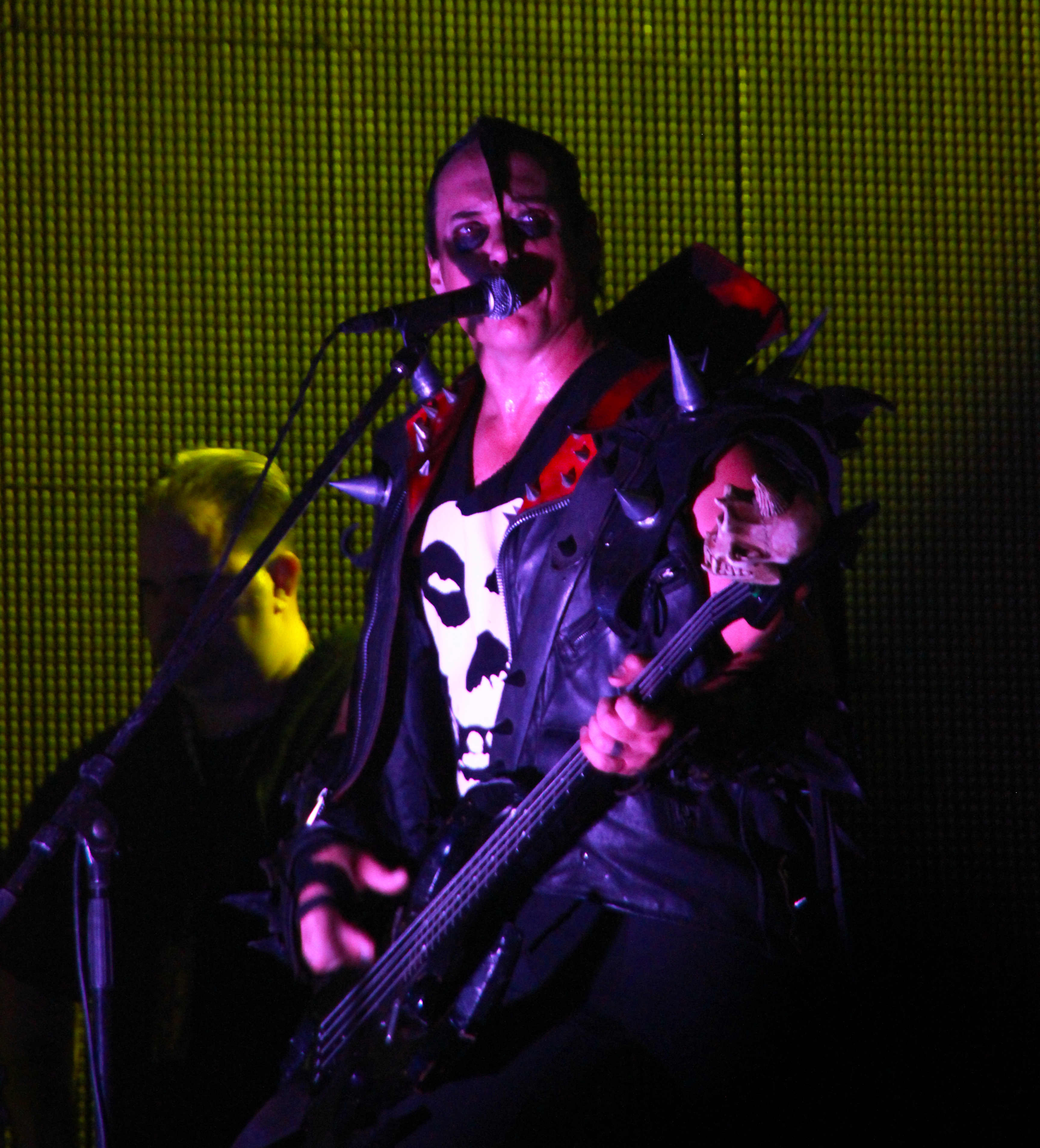 Выступление группы Misfits на фестивале Kubana в 2013 году.